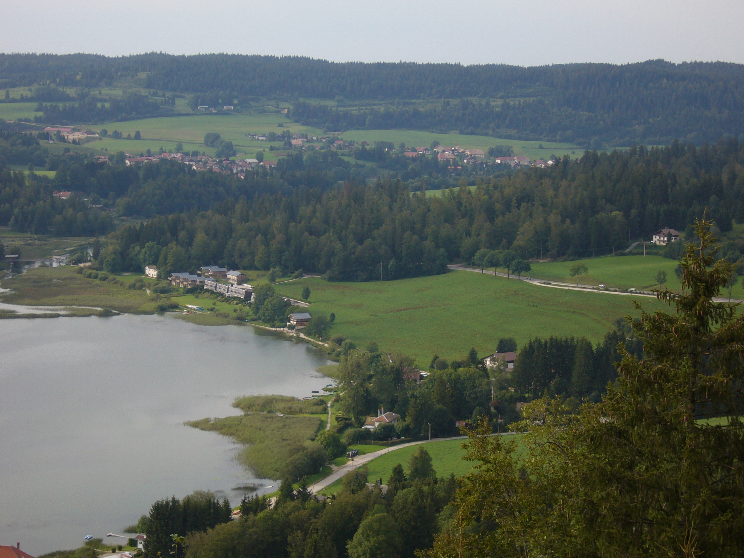 Vue de la commune de Oye-et-Pallet depuis le belvédère de Montperreux.